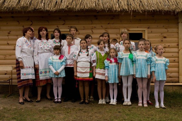 Свята ў музеі Здзітаўскі фальварак